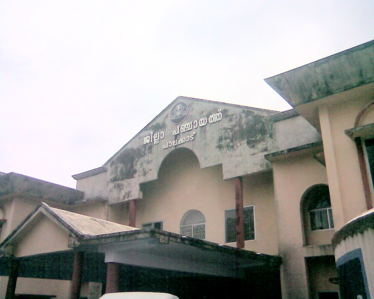 പാലക്കാട് ജില്ലാ പഞ്ചായത്ത് കാര്യാലയം